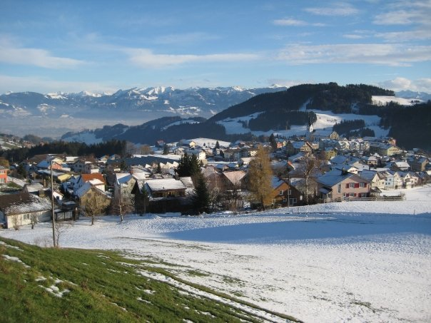 Oberegg Dorf von Westen aus gesehen